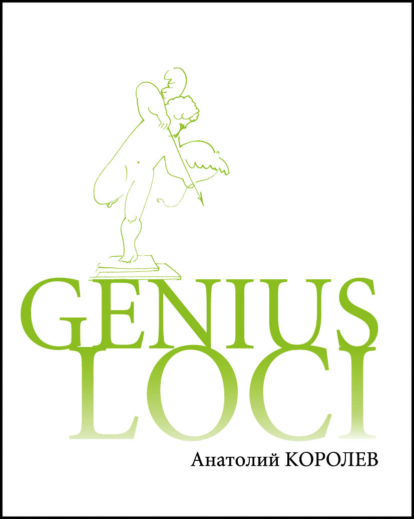 Роман "Гений местности" 2011 года издательства Arsis Books. Дизайн обложки выполнен автором романа, Анатолием Королёвым.